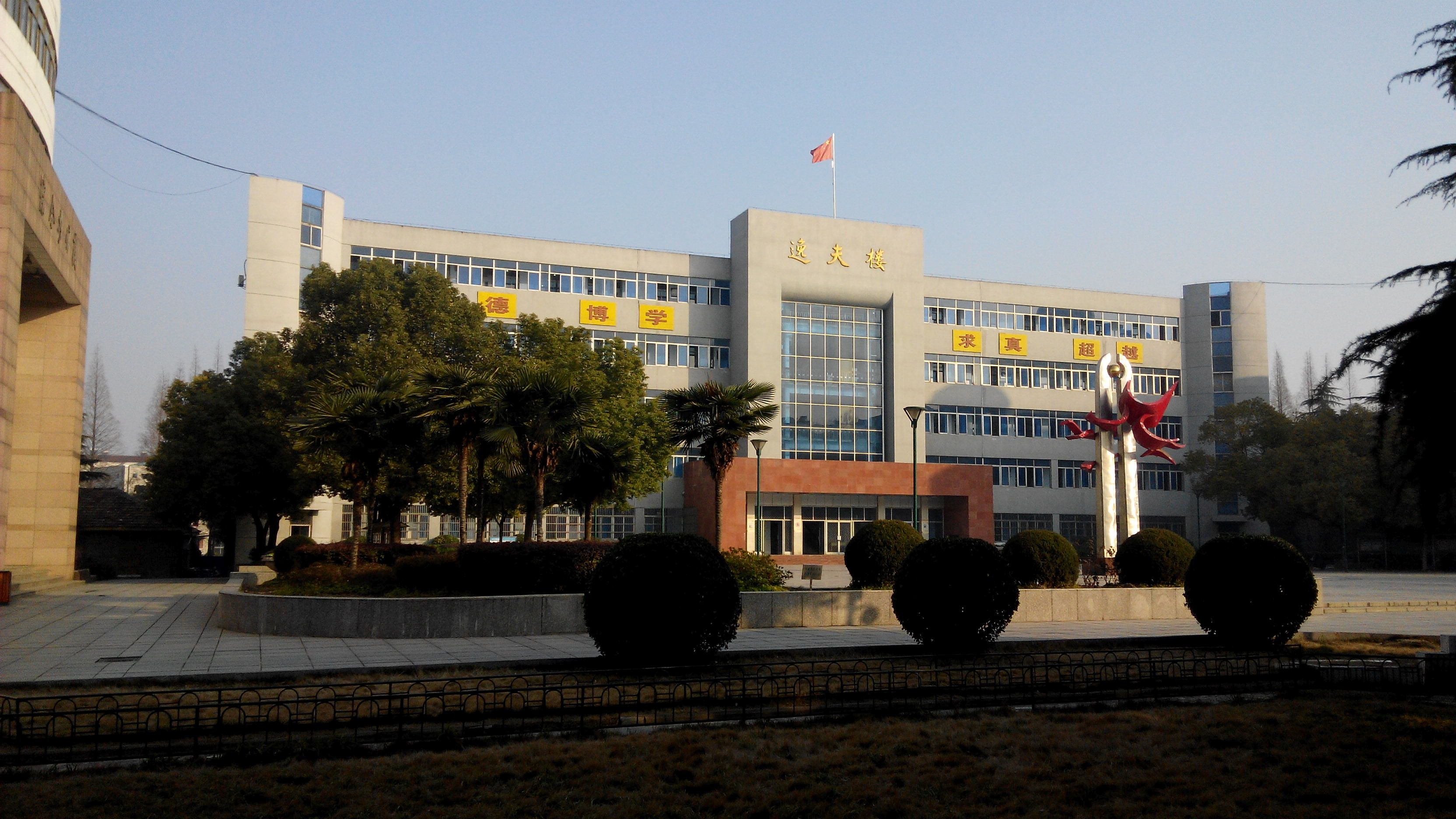 中文（中国大陆）: 无为中学-逸夫楼-近景